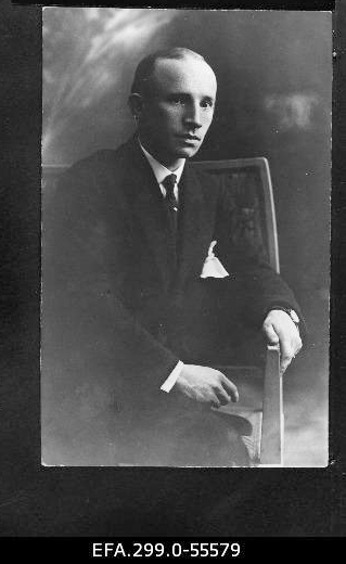 Балдуин Кусбок, основатель Первой Эстонской Киностудии